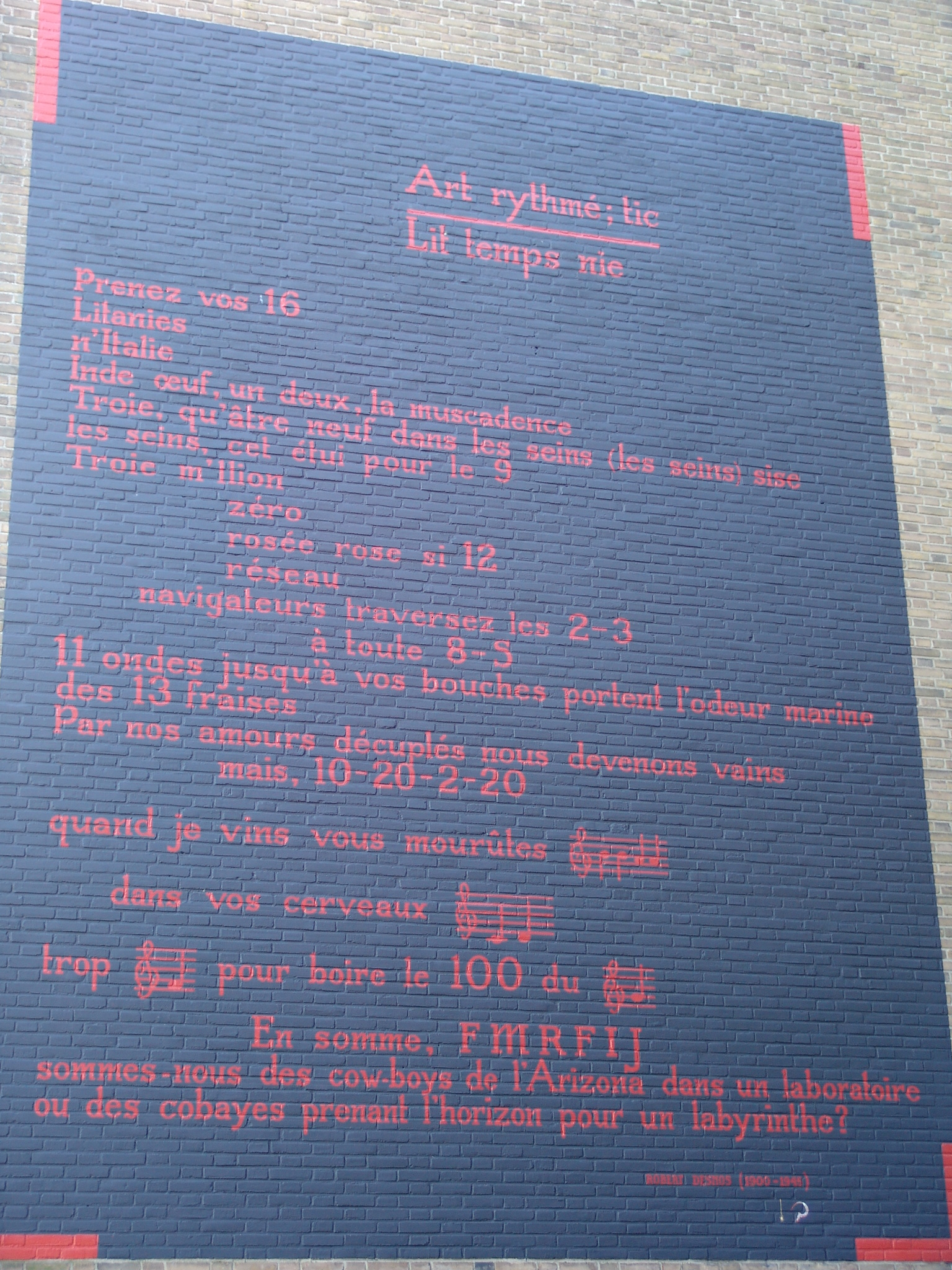 Robert Desnos - Art rythmé; tic/Lit temps nie (A-ritmische algebra/Slapend sleepliedje). Muurgedicht dat in het kader van het project Gedichten op muren van de Stichting TEGEN-BEELD is aangebracht op een muur in de Nederlandse stad Leiden.